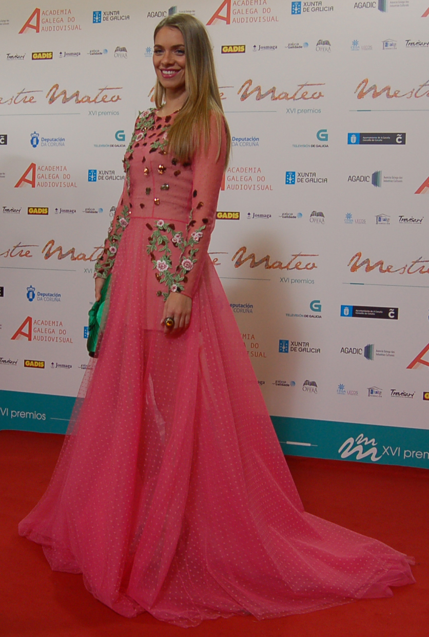 María Mera nos Premios Mestre Mateo 2017